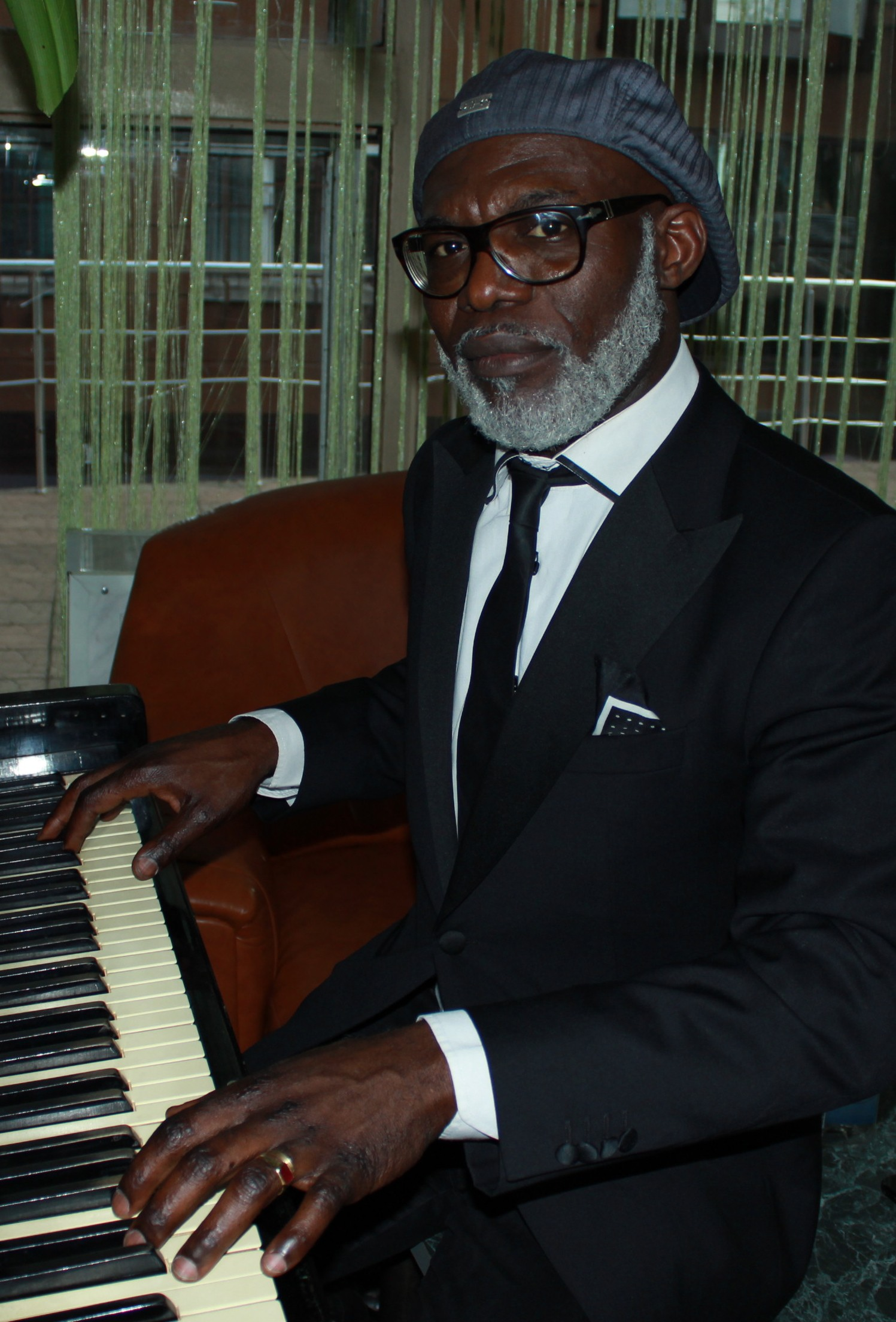 Eriq Ebouaney at the film festival in Vologda, Russia. July 9, 2013